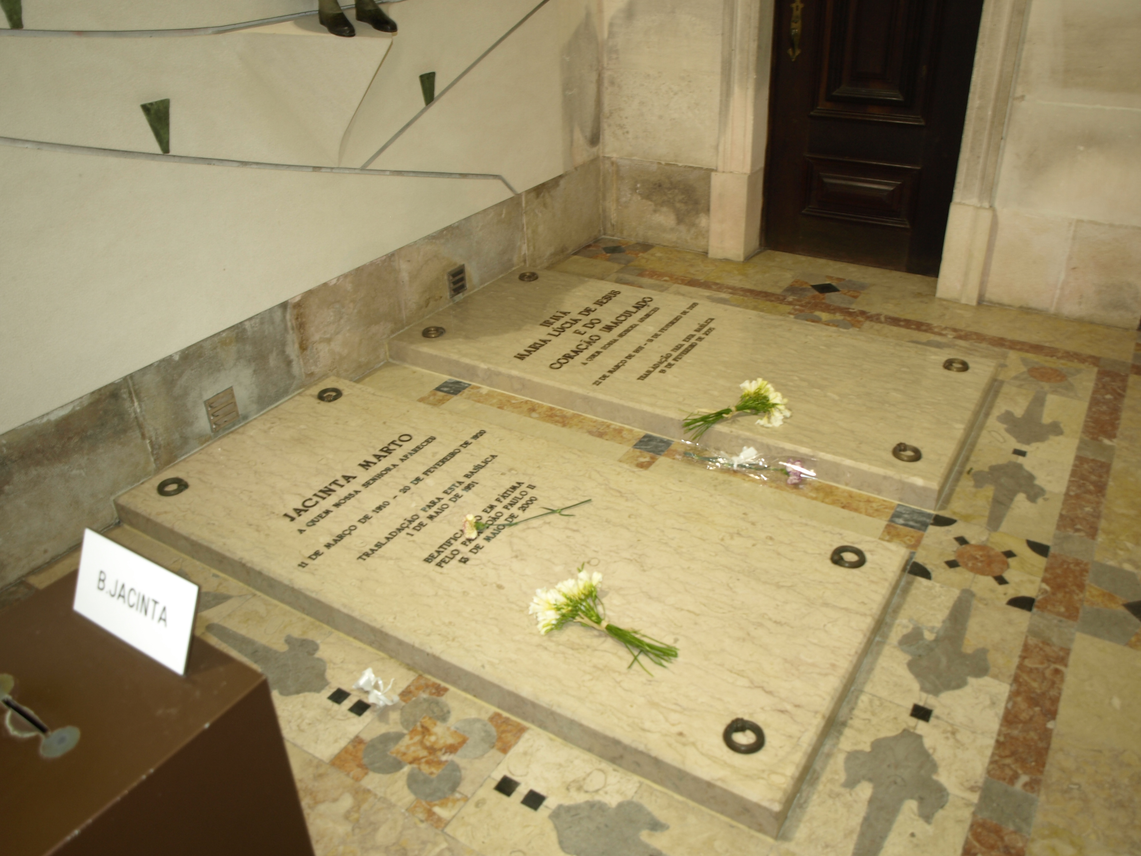 la tomba dei pastorelli veggenti all'interno del Santuario!!